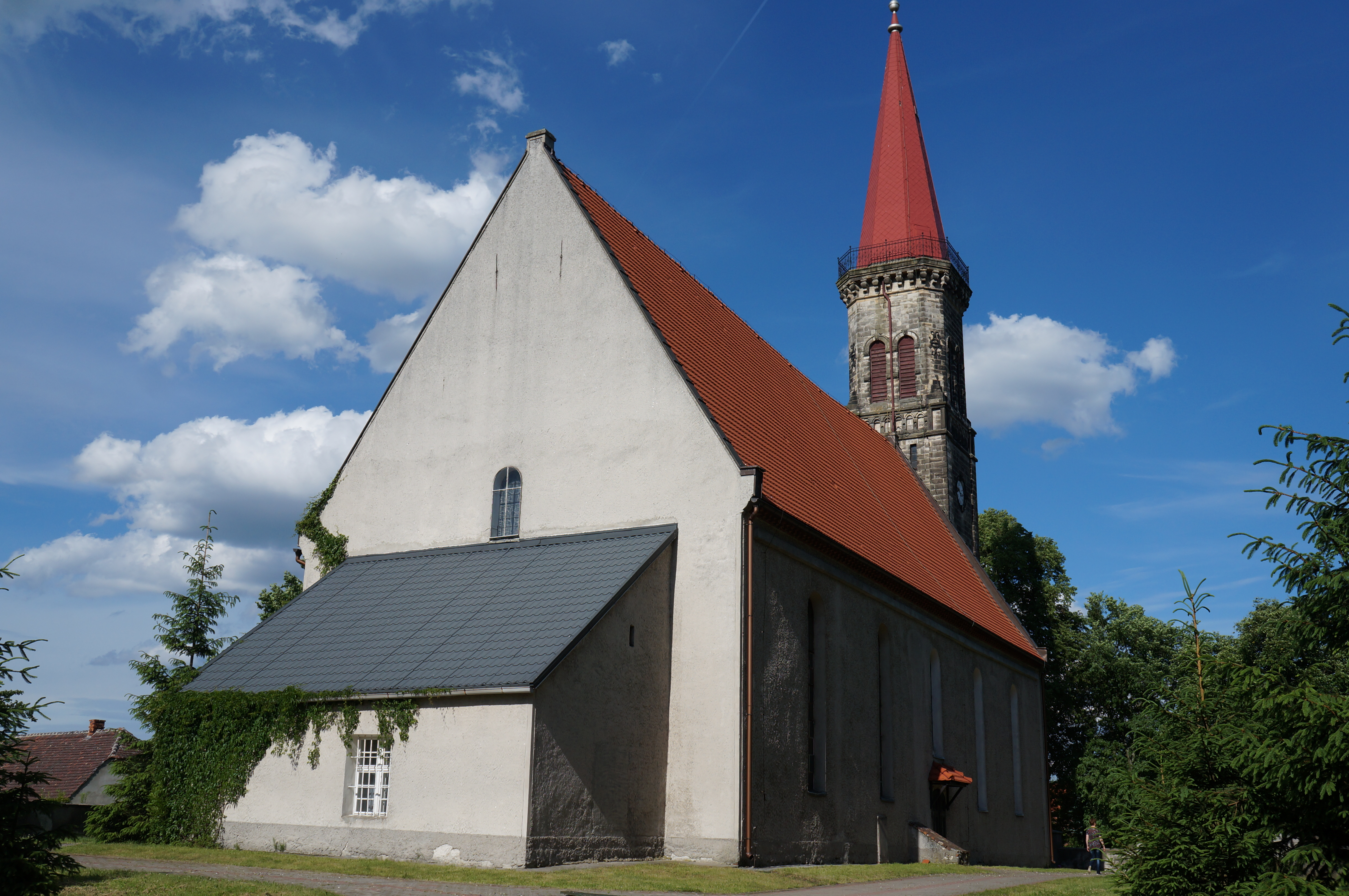 Parowa - rzymskokatolicki kościół parafialny p.w. św. Antoniego Padewskiego, 1498, 2 poł. XVIII, 1901